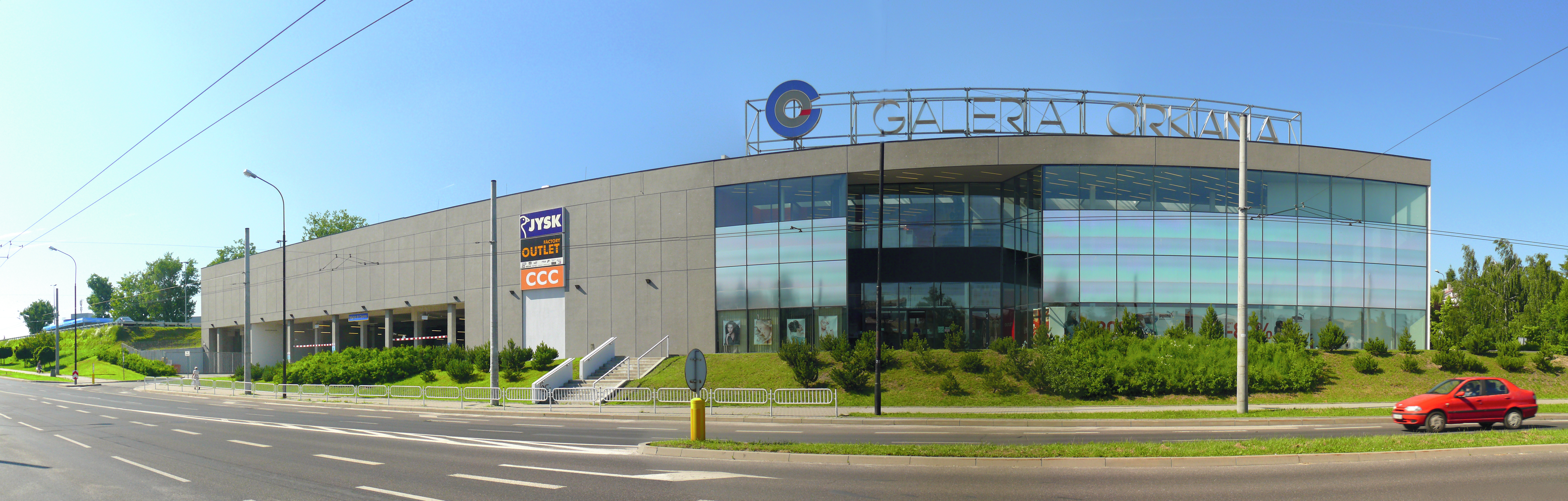 Budynek galerii handlowej "Orkana" przy ulicy o tej samej nazwie, w Lublinie, w dzielnicy Czuby.